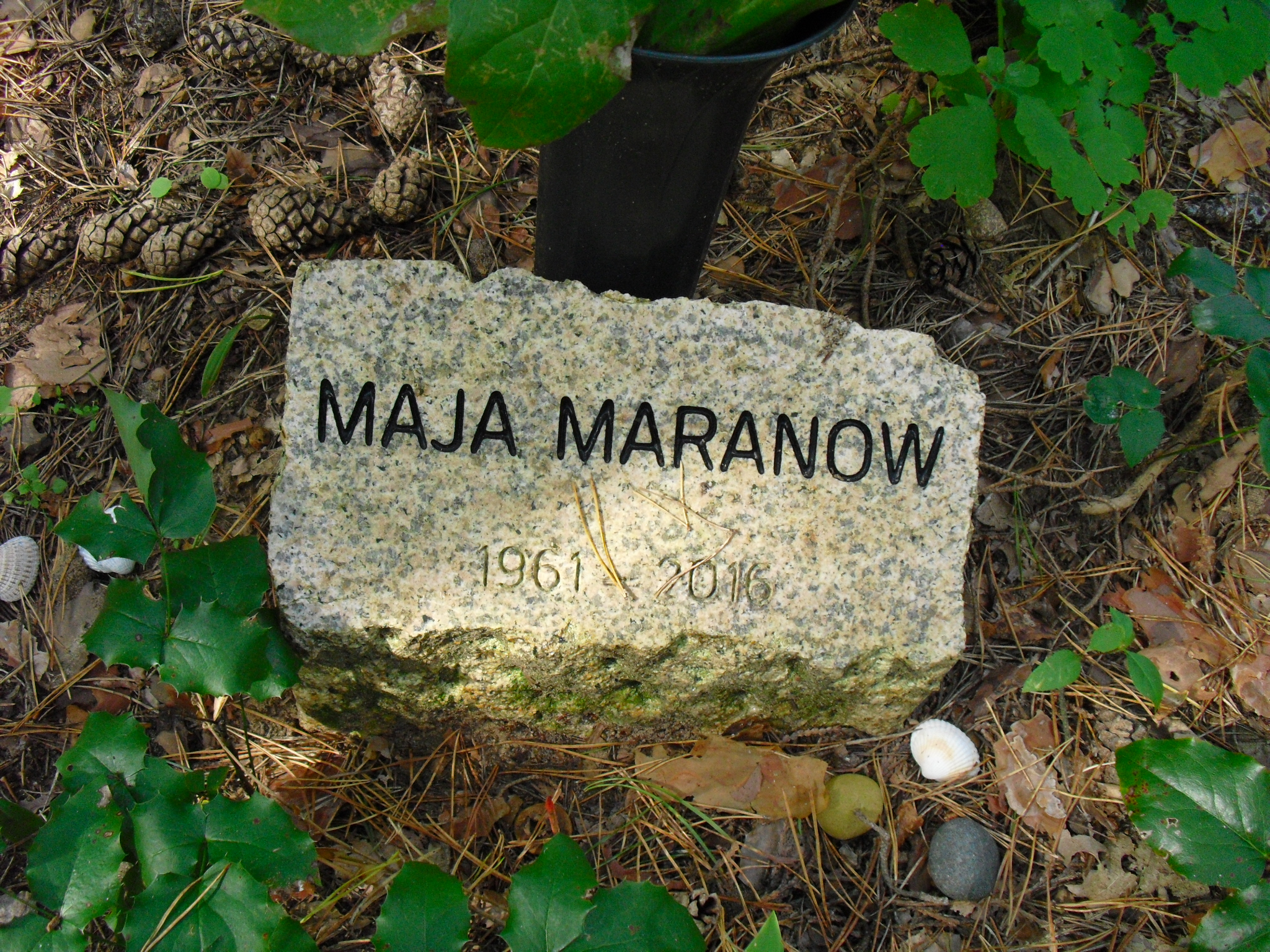 Grabstein für die Schauspielerin Maja Maranow auf dem Südwestkirchhof Stahnsdorf